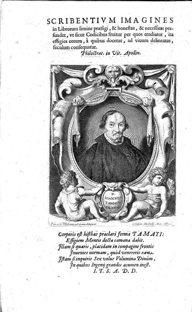 Juan Tamayo de Salazar, Anamnisis sive Commemoratonis sanctorum hispanorum, impreso en Lyon, 1662, como tomo VI del Martyrologium Hispanum. Retrato del autor por Pedro de Villafranca firmado en 1650.